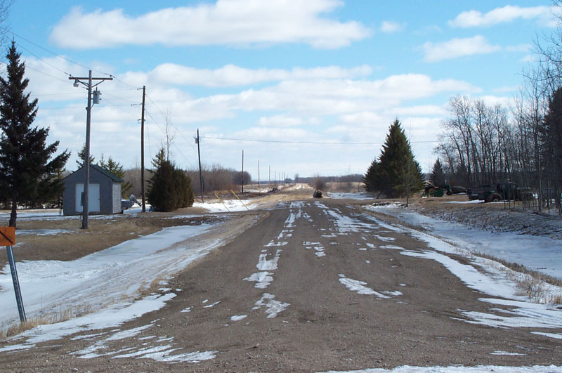 Mavie, Minnesota